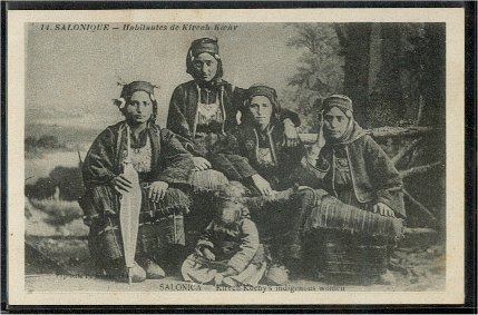 Жители на Киреч Кьой в началото на 20 век